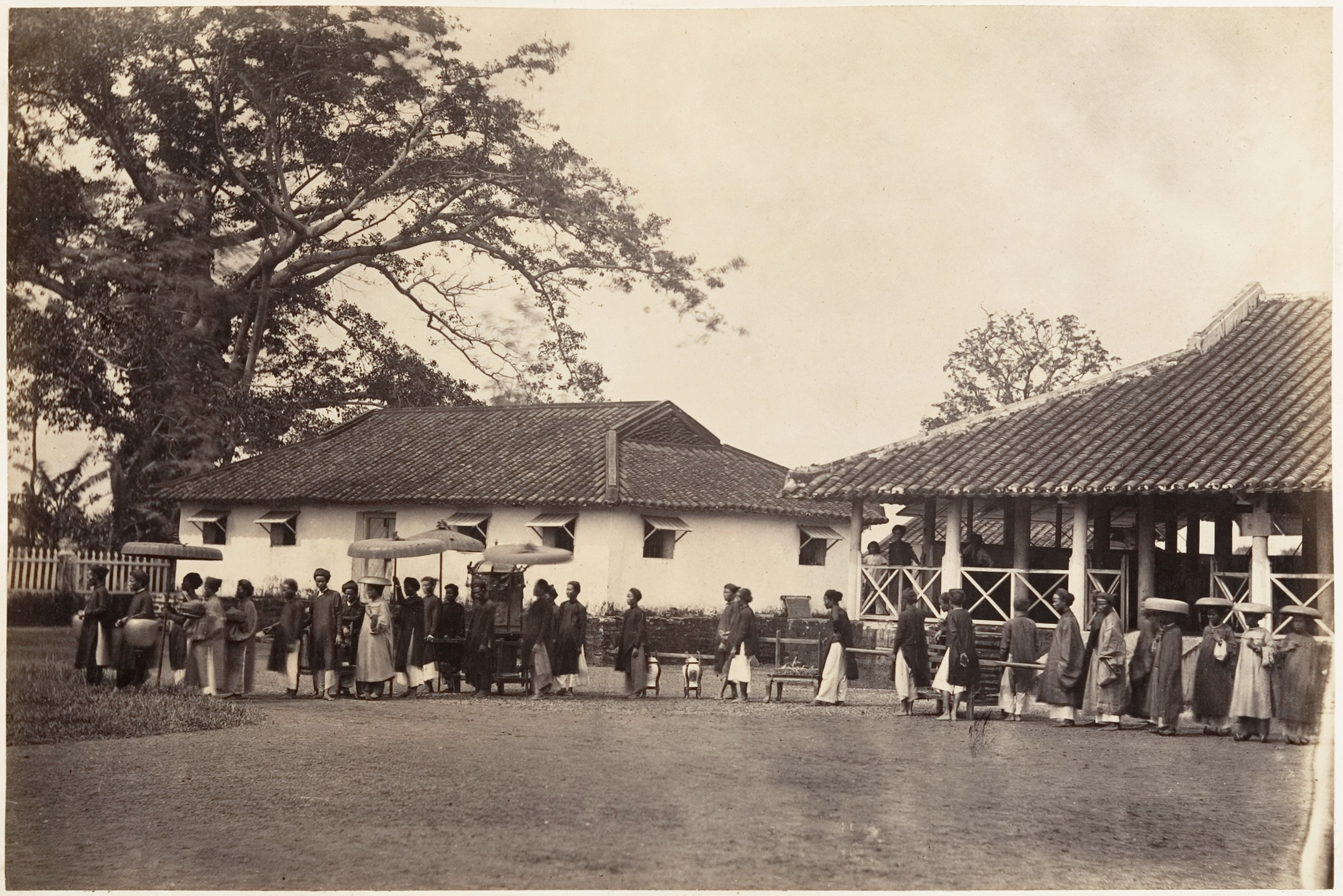 Một đám cưới ở Saigon năm 1866. Xem kỹ sẽ thấy: trừ cô dâu và bốn phụ nữ đứng ở sau cùng là có đi hài mũi nhổng, tất cả mọi người khác đều đi chân đất (mở hình ở cỡ lớn nhất để xem cho rõ). Áo dài nữ thời đó khác xa với thời nay, còn áo dài nam có vẻ không khác nhiều so với hiện nay, tức gần 150 năm sau.